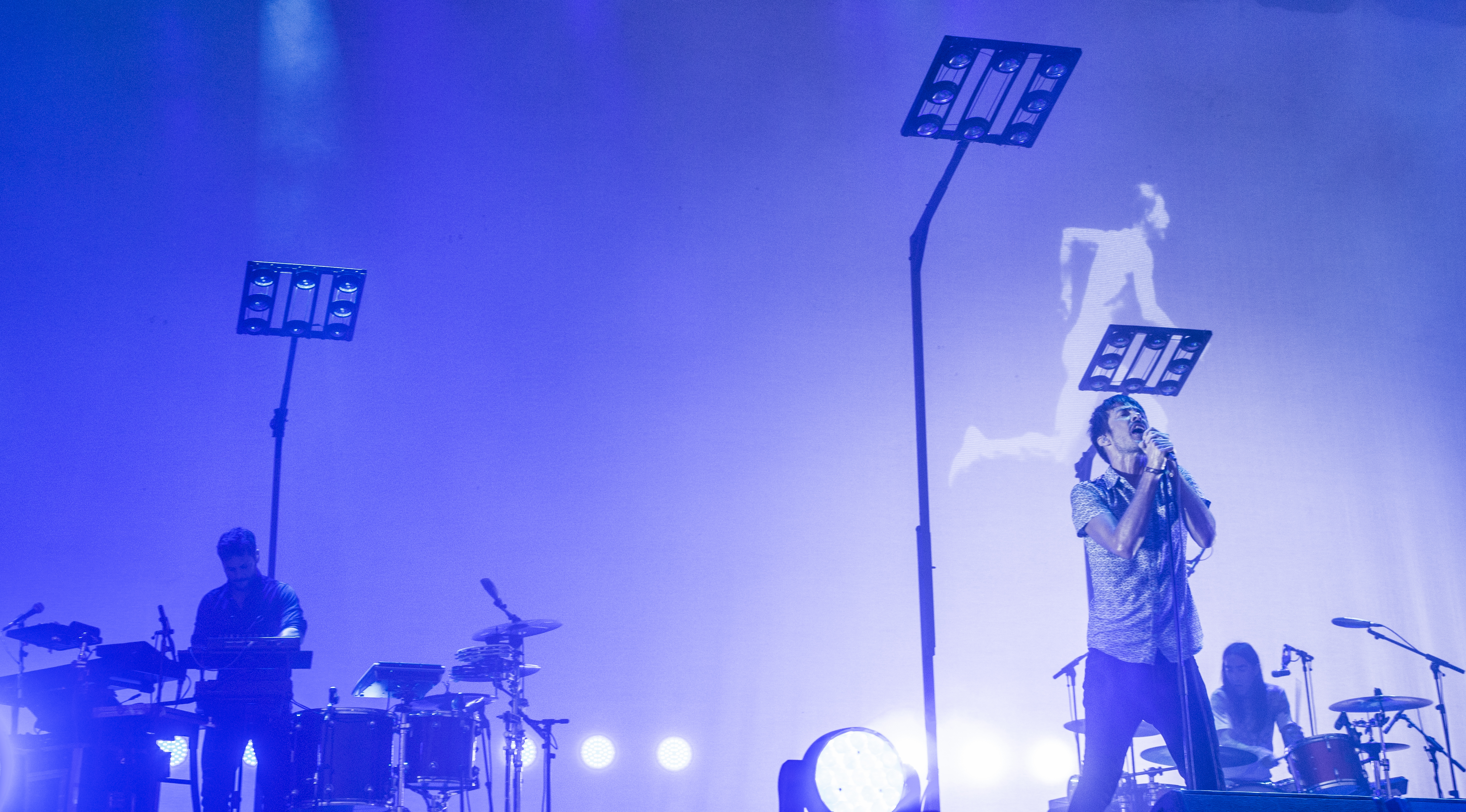 FIB 2015